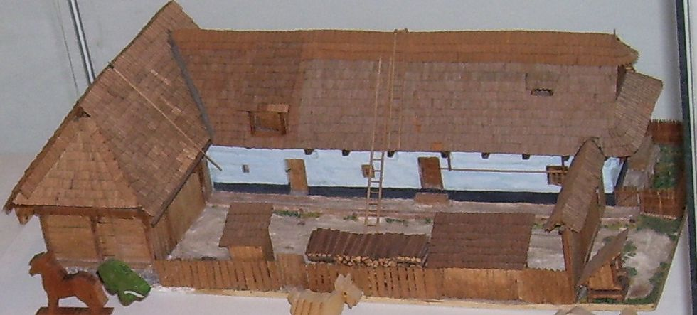 A kékkői vármúzeumban található játékkiállításon látható makett, Szlovákia